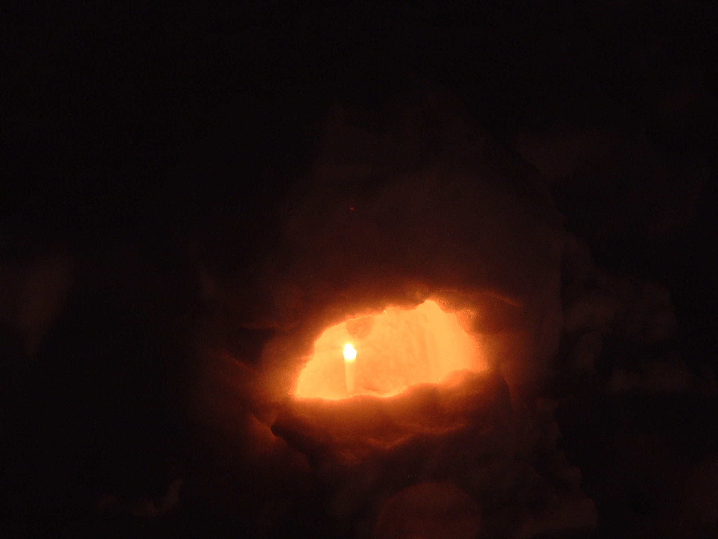 ほんやら洞。ちょうどバケツ一杯分の雪で小さなかまくらを作り、中にろうそくを立てる。 簡単に作るには、バケツに雪を詰め込んでからひっくり返し、くぼみを掘り込むだけでもよい。